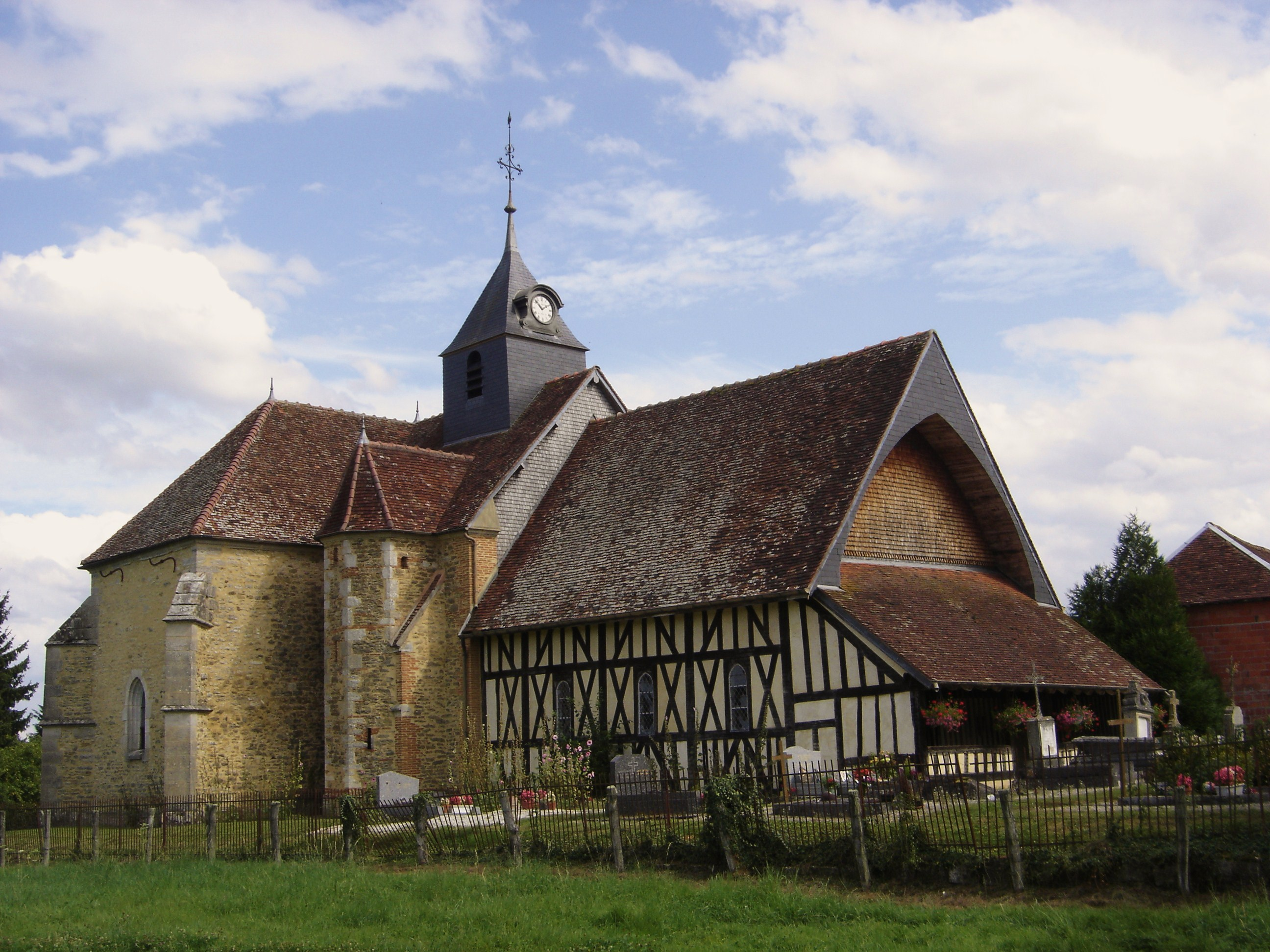 église Notre Dame de l'Assomption - Chauffour-lès-Bailly - Aube - France